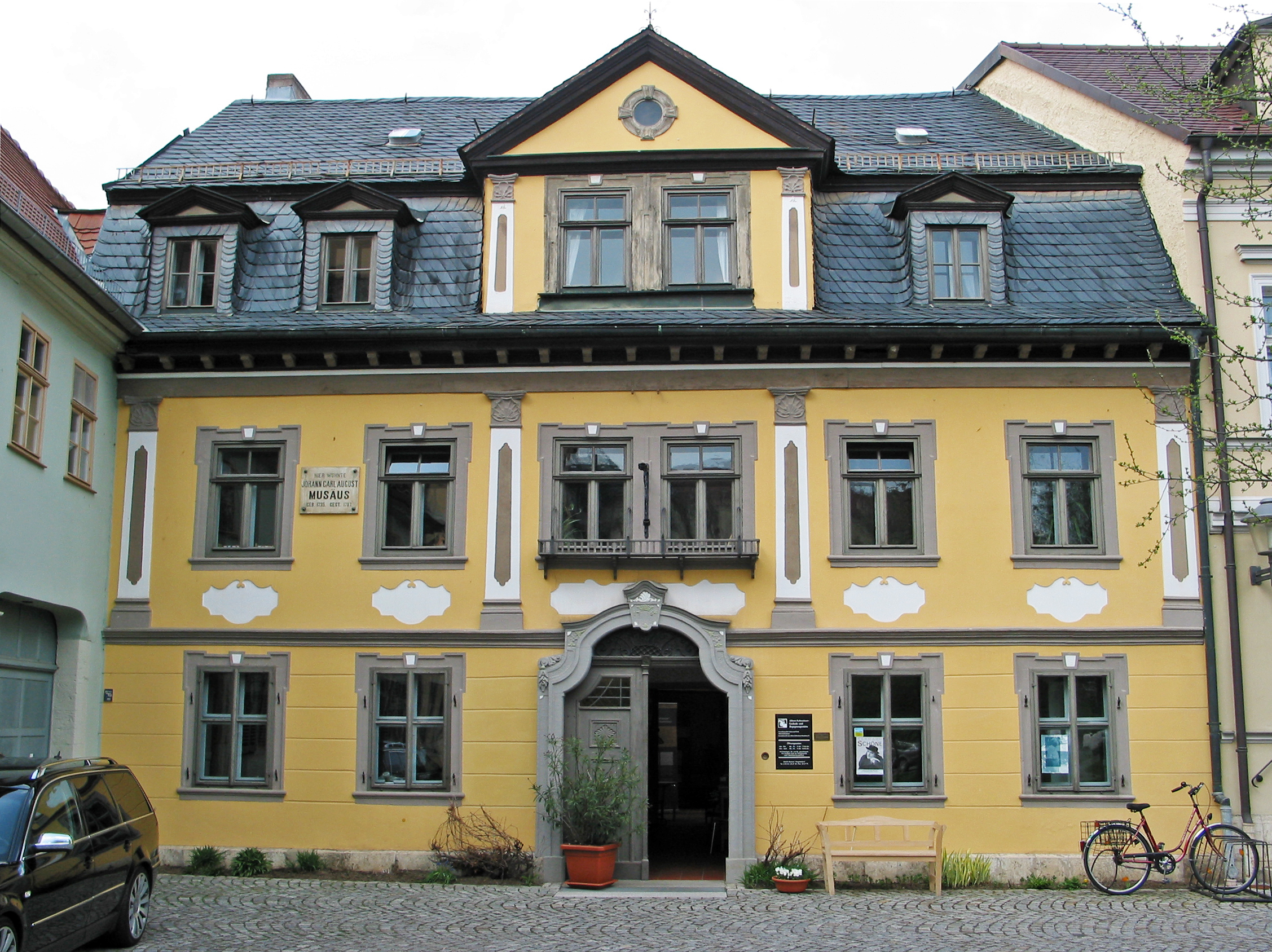 Das ehemalige Wohnhaus von Johann Carl August Musäus in Weimar. Heute Albert-Schweitzer-Gedenk- und Begegnungsstätte.